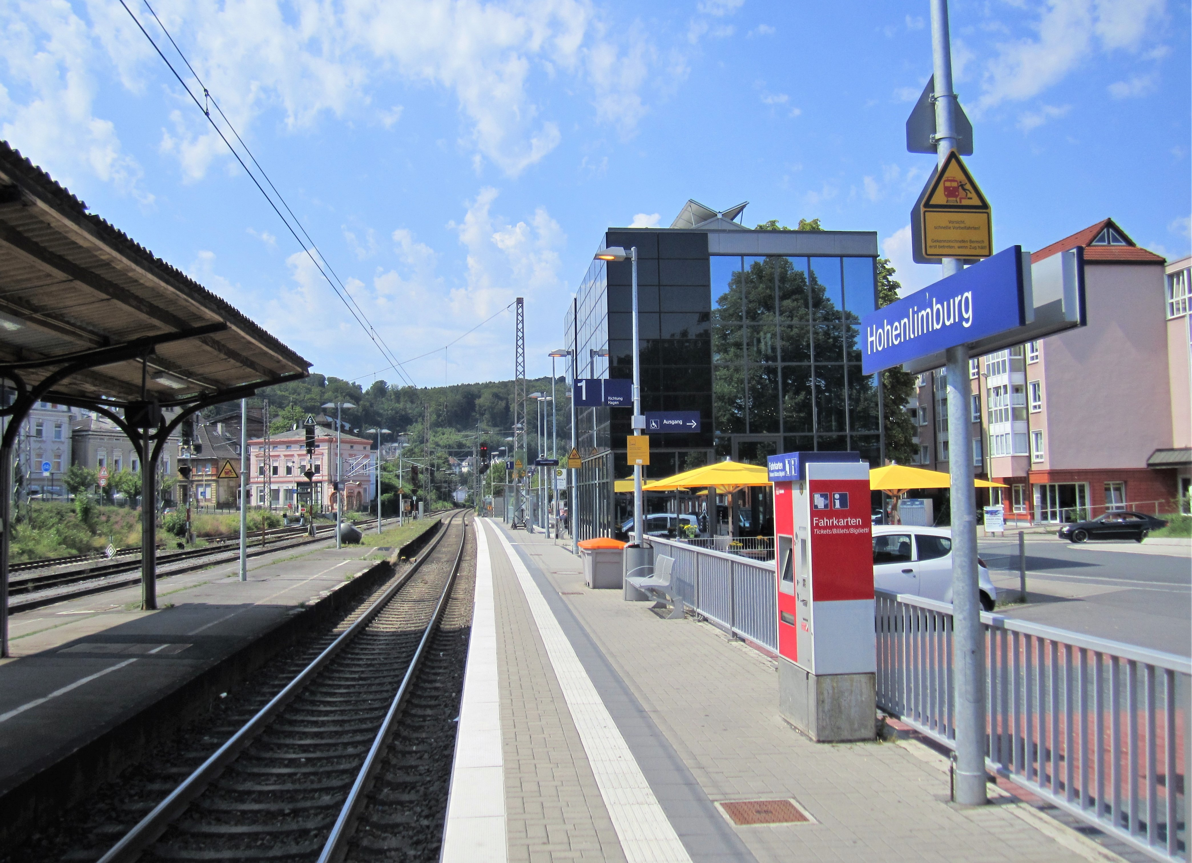 Bahnhof an der Ruhr-Sieg-Strecke im Hagener Stadtteil Hohenlimburg, Bahnstraße. Nach dem Abriss des Bahnhofsgebäude 2011 wurde ein Bahnsteig-Bahnhof ohne Gebäude errichtet. Gleis 1 (Foto) Richtung Hagen, Gleis 2 Richtung Siegen. In dem Glaskubus-Gebäude befindet sich ein Café. – Im September 1859 wurde die erste Teilstrecke Hagen-Limburg-Letmathe der Ruhr-Sieg-Bahn in Betrieb genommen, die bis 1863 durch das Lennetal das Siegerland und dann auch das Rhein-Main-Gebiet sowie Süddeutschland erreichte.